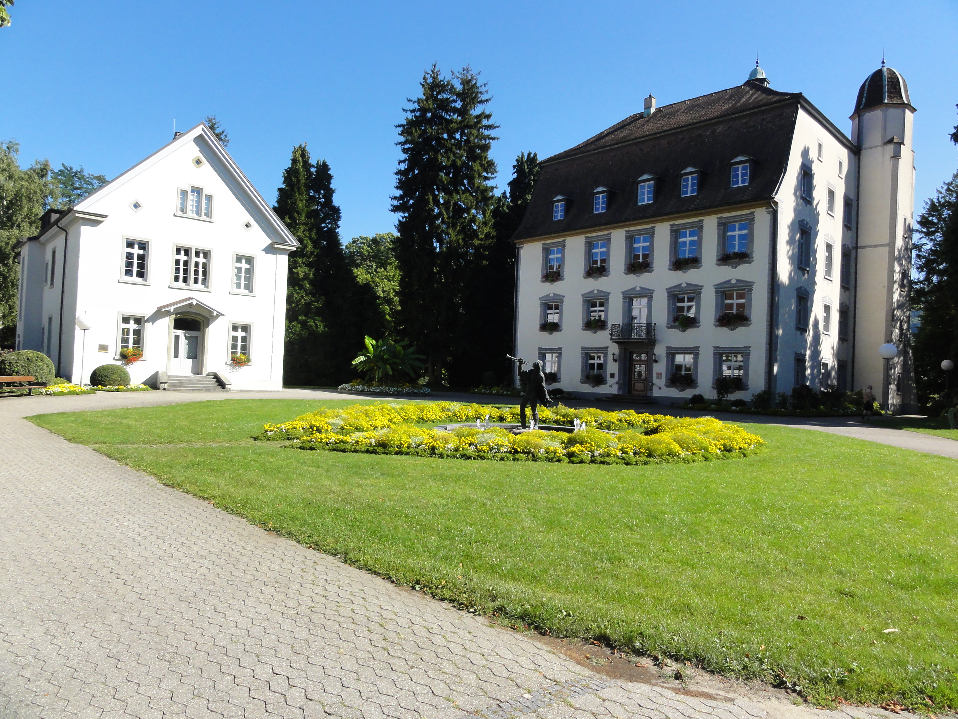 Bad Säckingen: Schloss Schönau (rechts), Frontansicht im Abendlicht